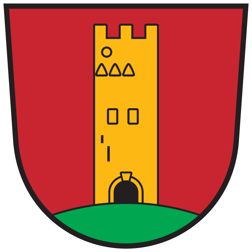 Wappen von Winklern